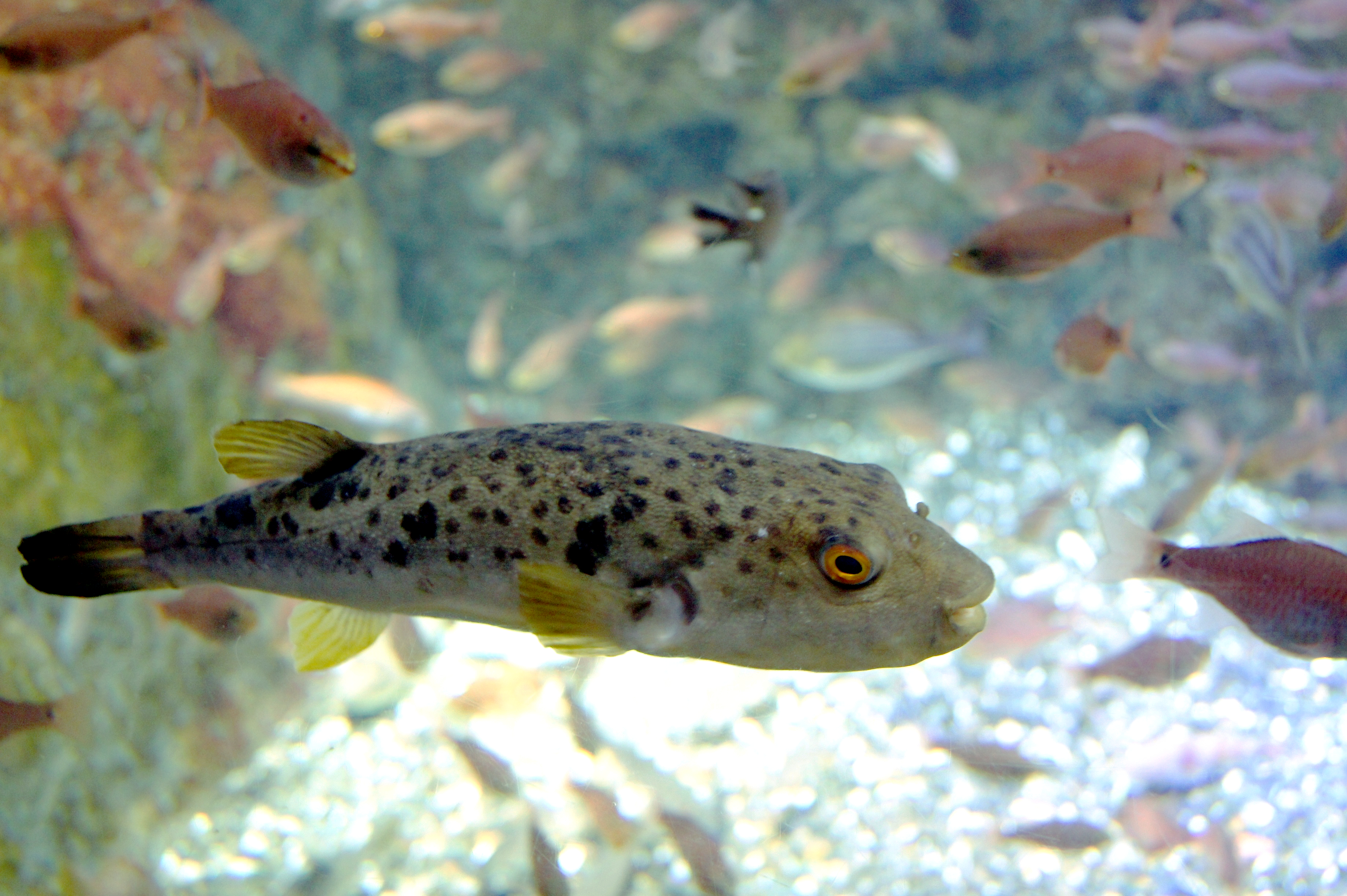 クサフグ。新江ノ島水族館にて撮影